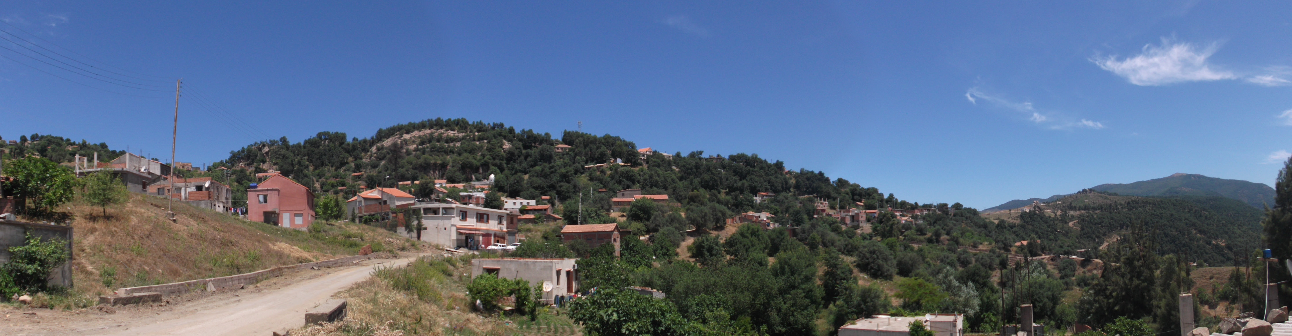 ciel d'Ait Ouchene